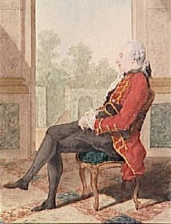 Charles-Louis de Beauchamp, comte de Merle, French diplomat.Note: Identity uncertain. Son of Pierre Beauchamp(1636-1719)?